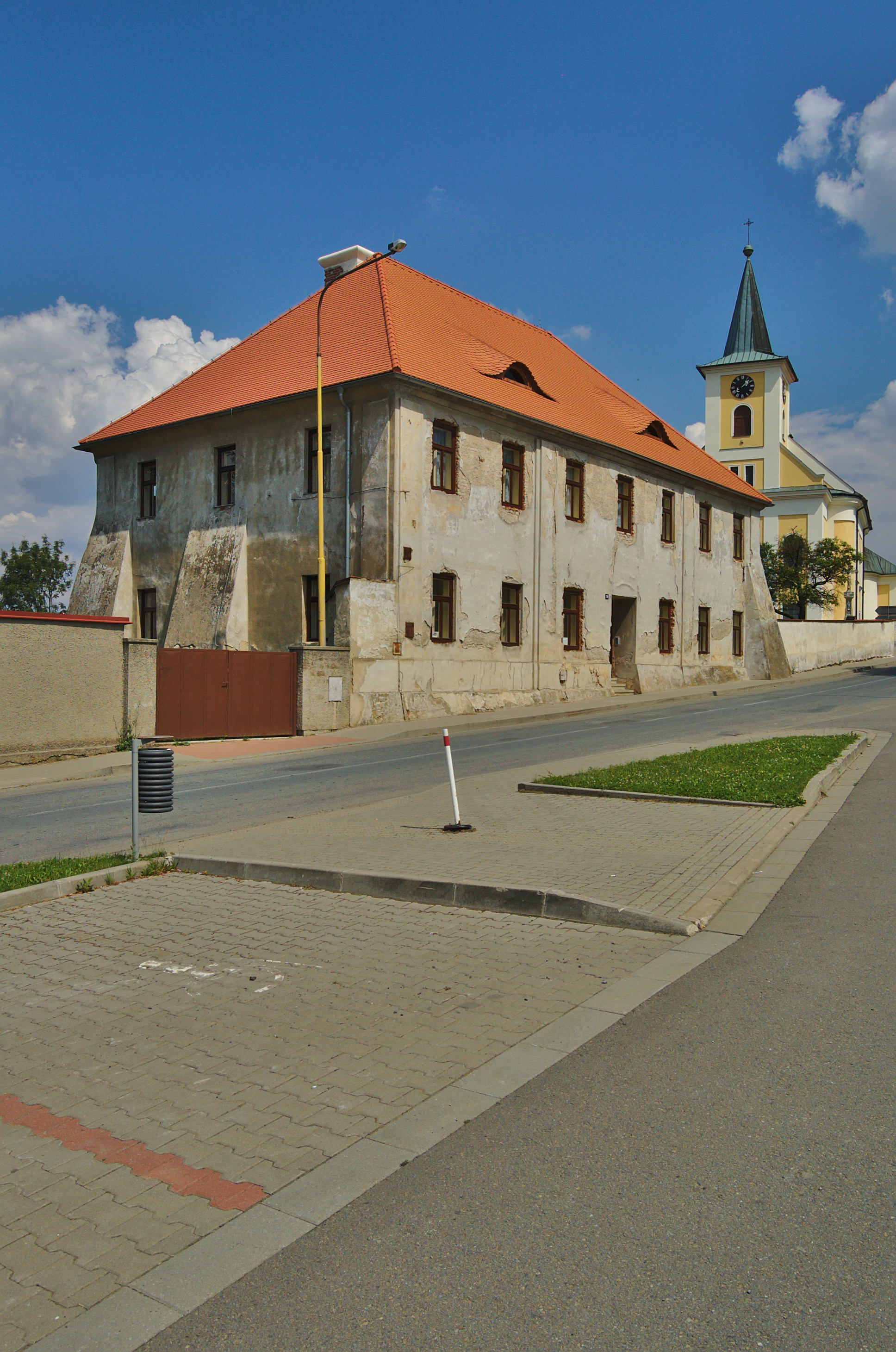 Fara, Protivanov, okres Prostějov